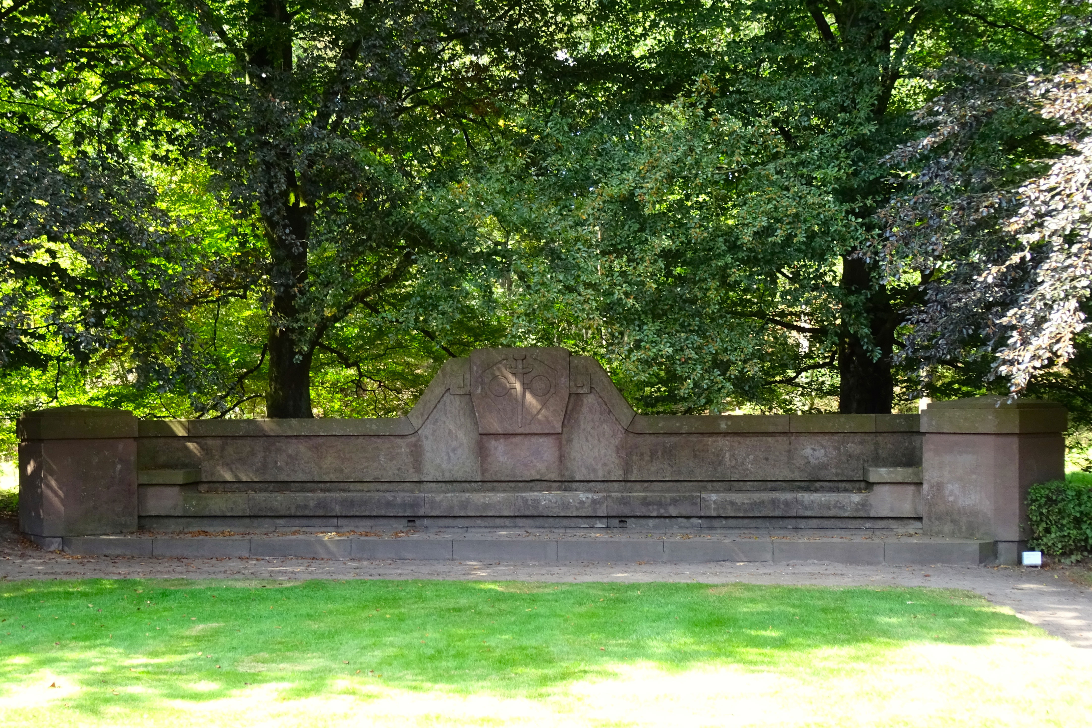 President Steynbank door Henry Van de Velde, Hoge Veluwe